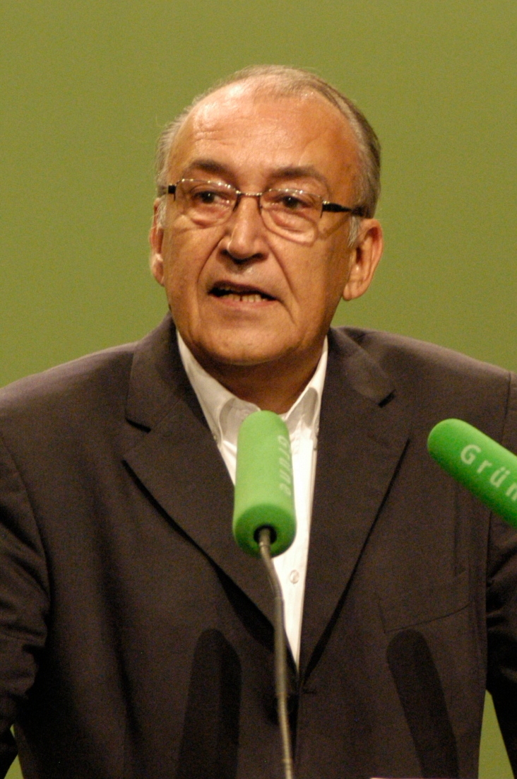 Herbert Napp, Grußwort, LDK Bündnis 90/Die Grünen NRW, Neuss 19-6-2010